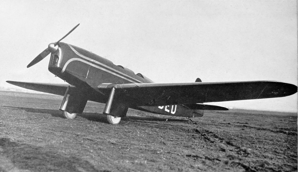 letecký motor Walter Major 4 a letoun Be-52 Beta Major (1936)